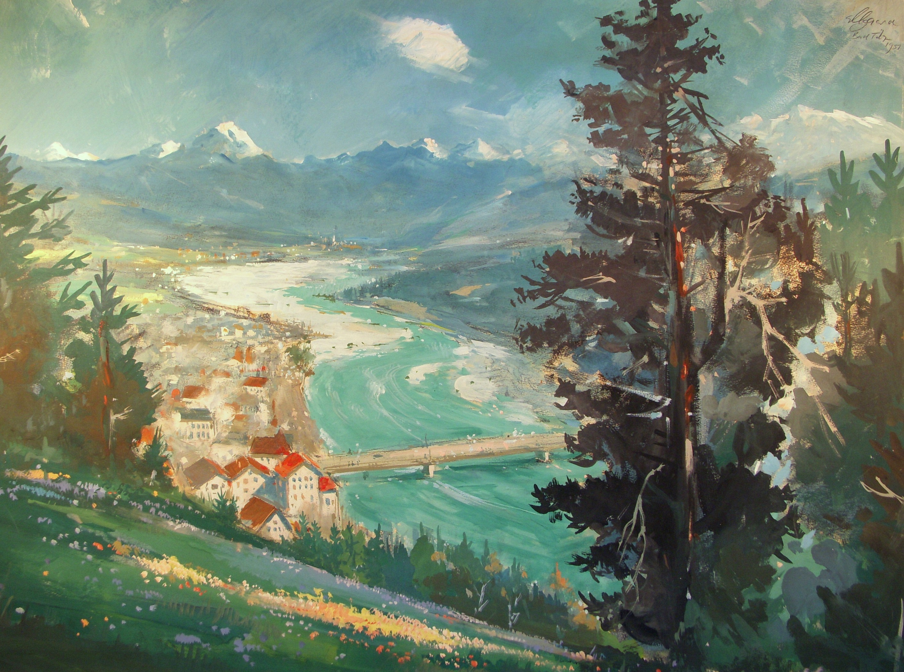 Bad Tölz in Oberbayern